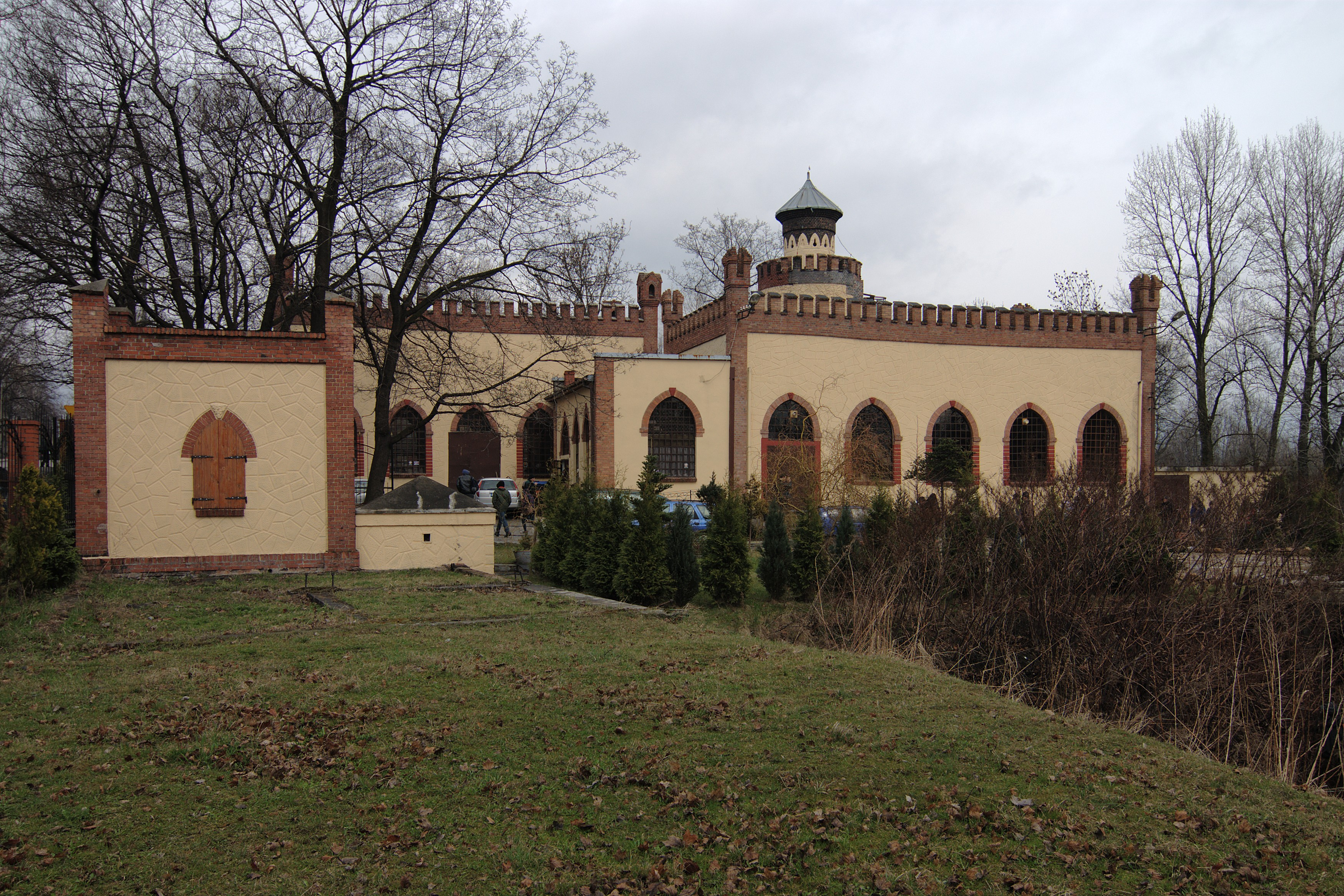 Chorzów. Szyb Elżbieta.